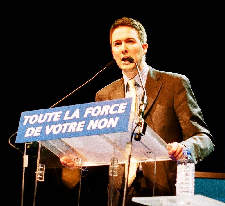 Guillaume Peltier au meeting du MPF devant 5000 partisans à Paris